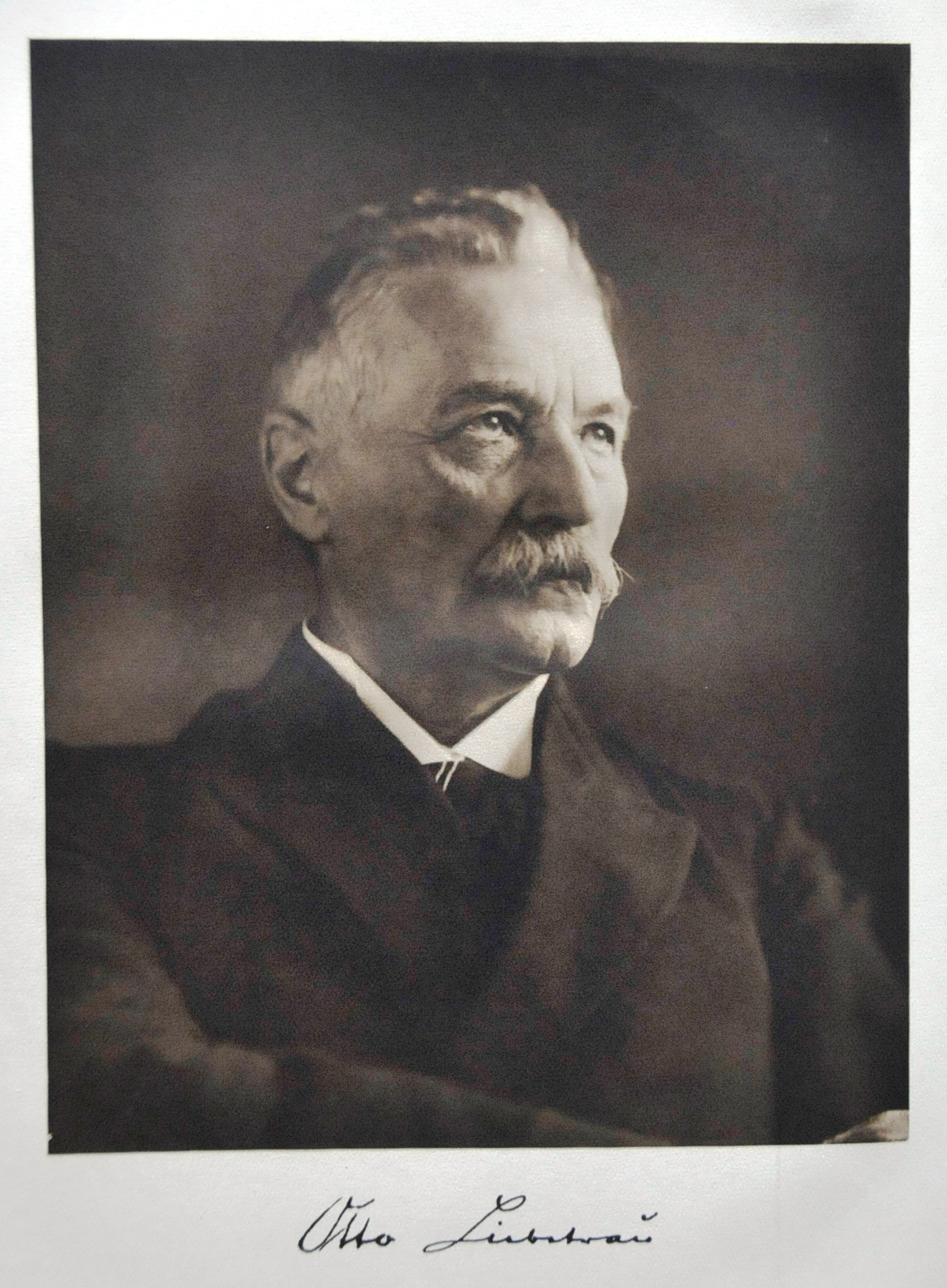 Porträt von Otto Liebetrau